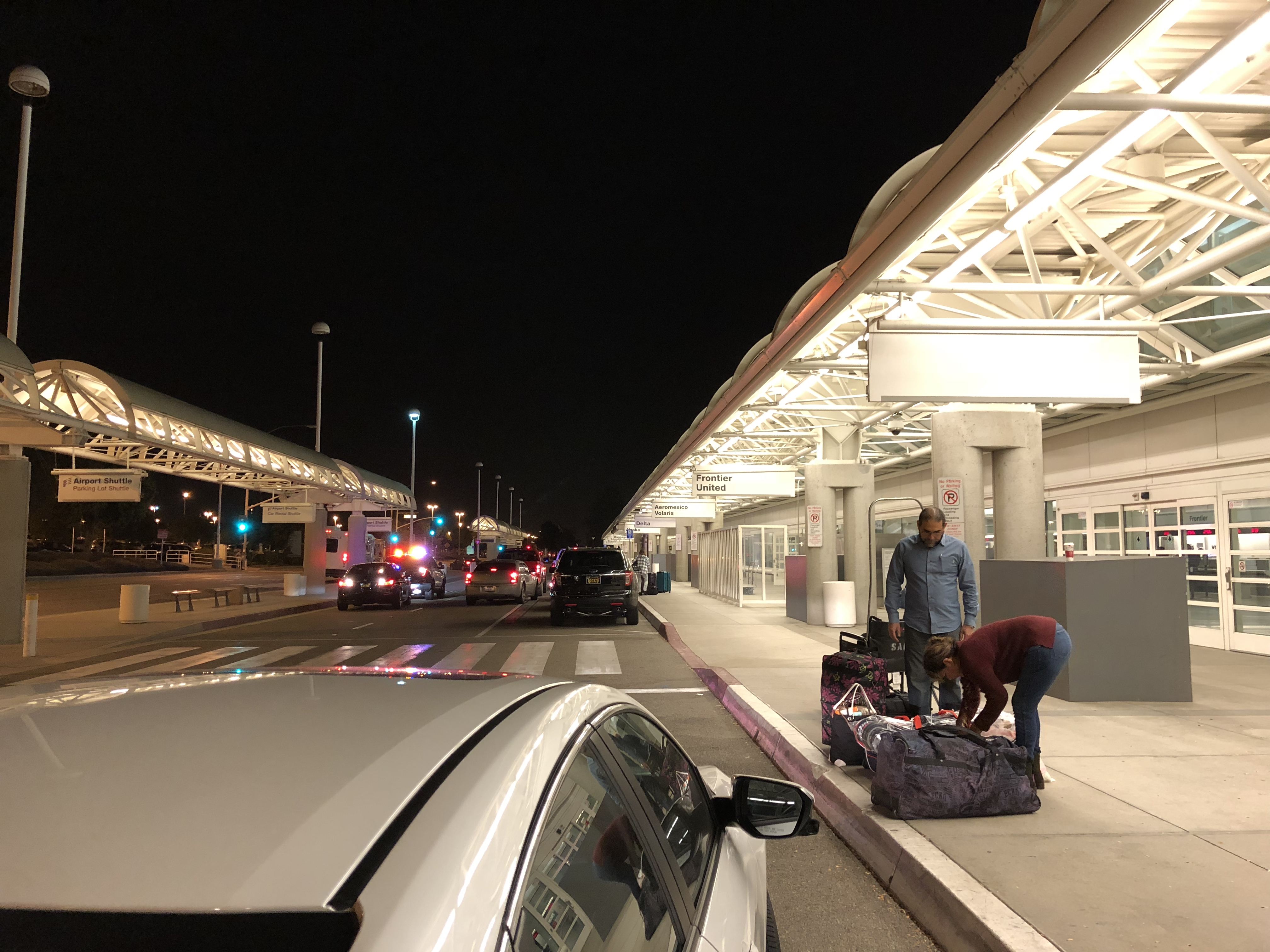 Entrada de la Terminal 2 del Aeropuerto Internacional de Ontario.